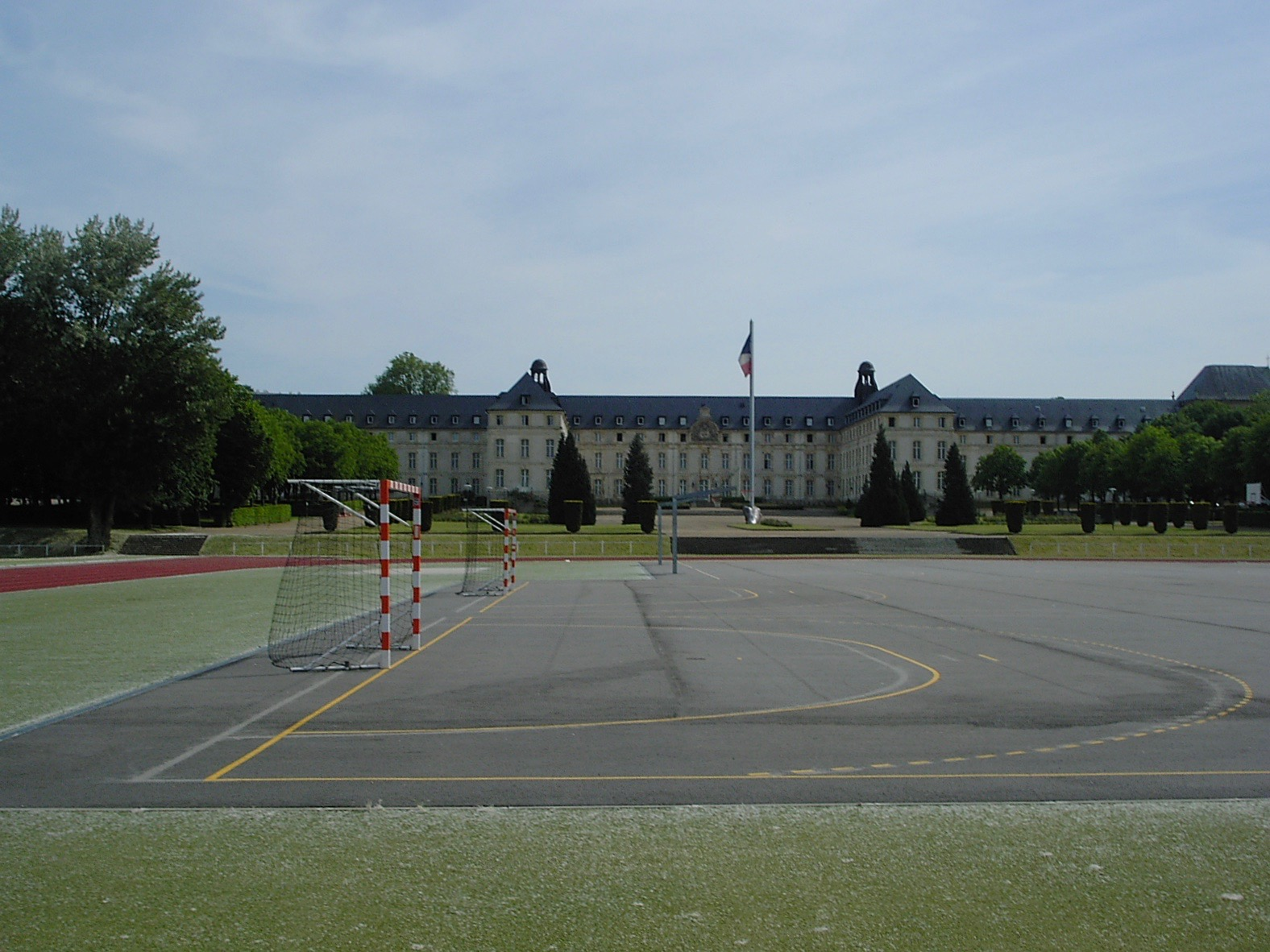 Vue générale du Lycée Militaire de Saint Cyr Auteur: Ledoux Olivier - user : Olivier10546 Site : Licensing Catégorie:Image de Saint-Cyr-l'École